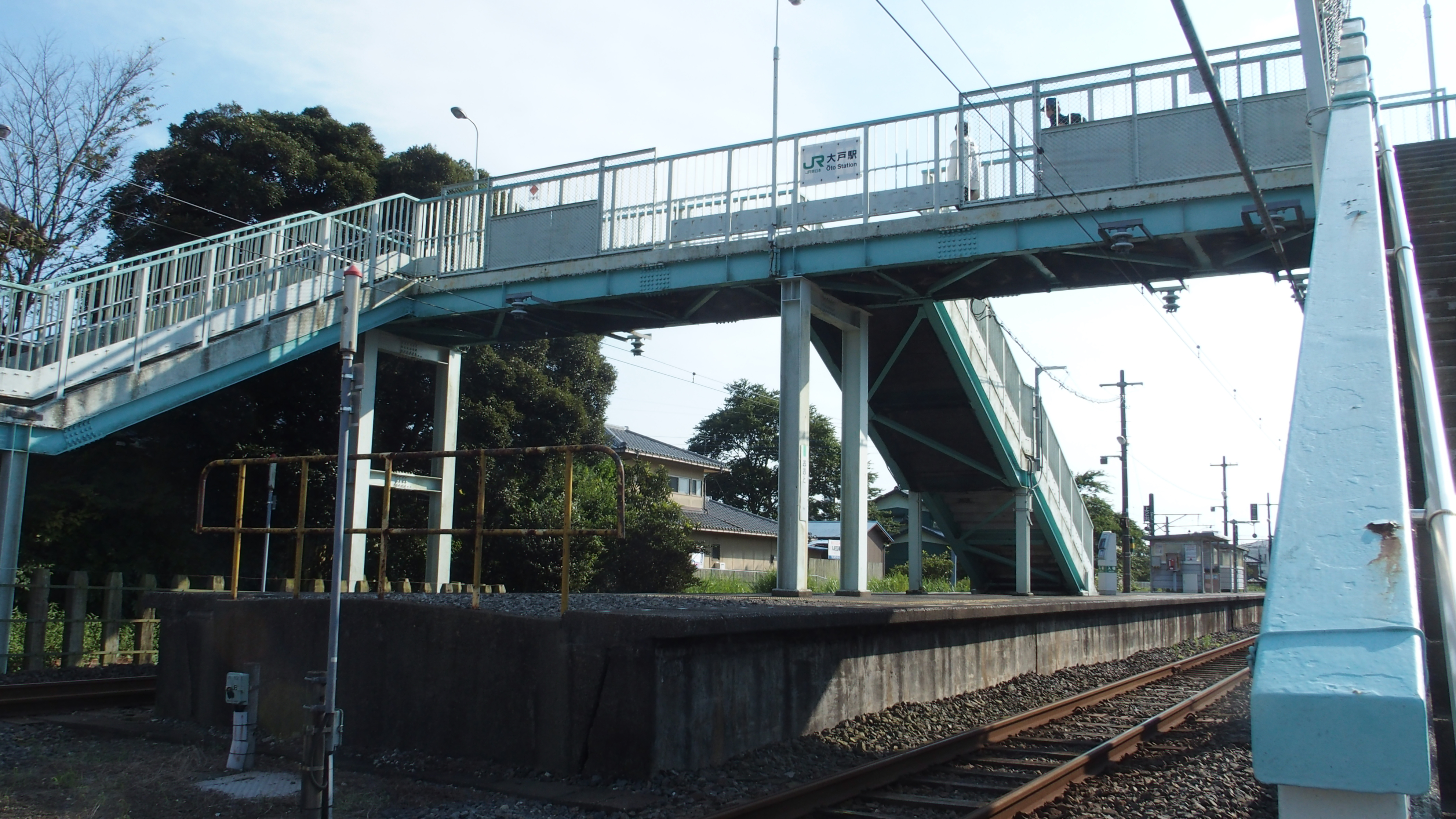 大戸駅(跨線橋)